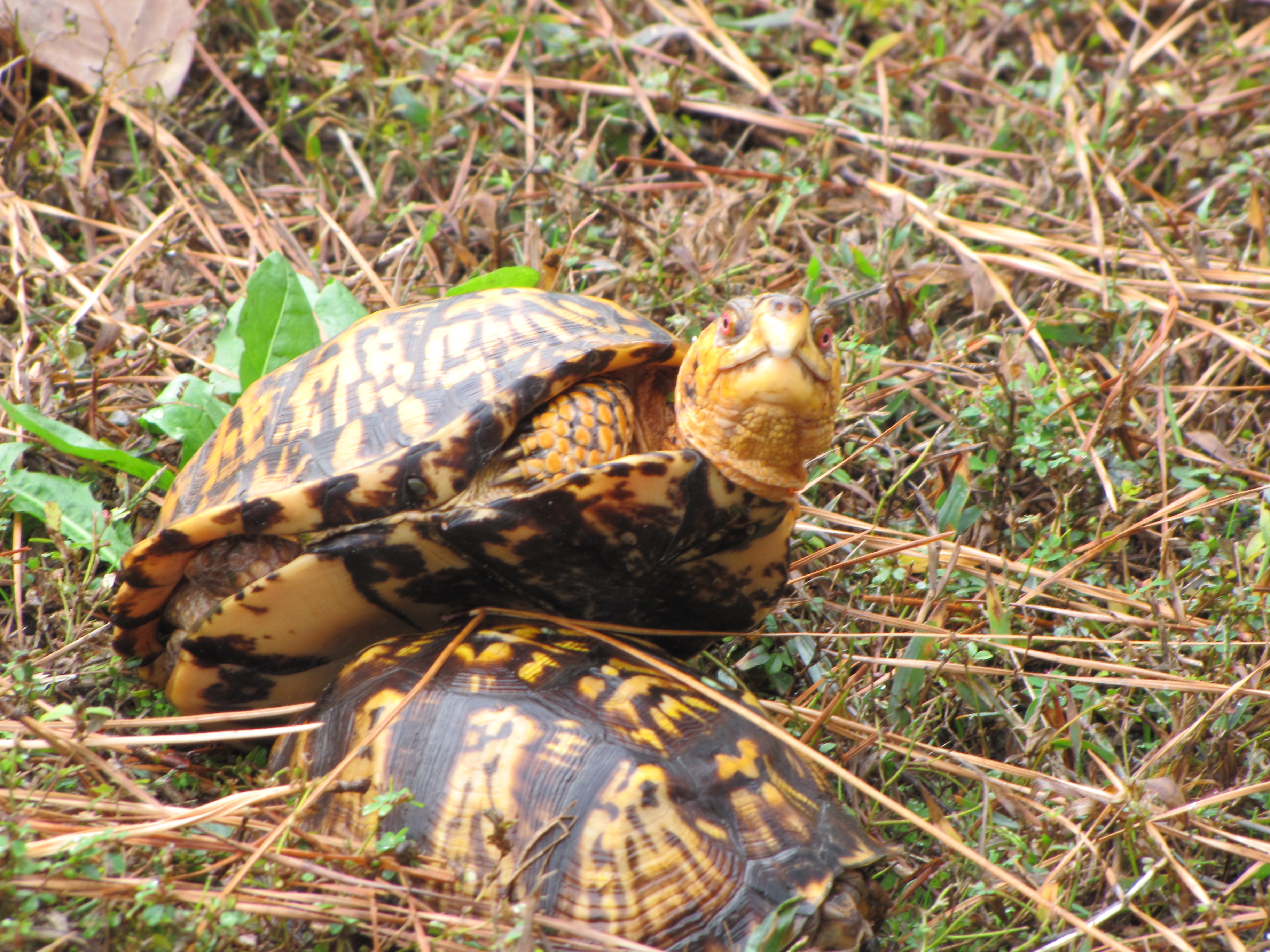 Excuse you....